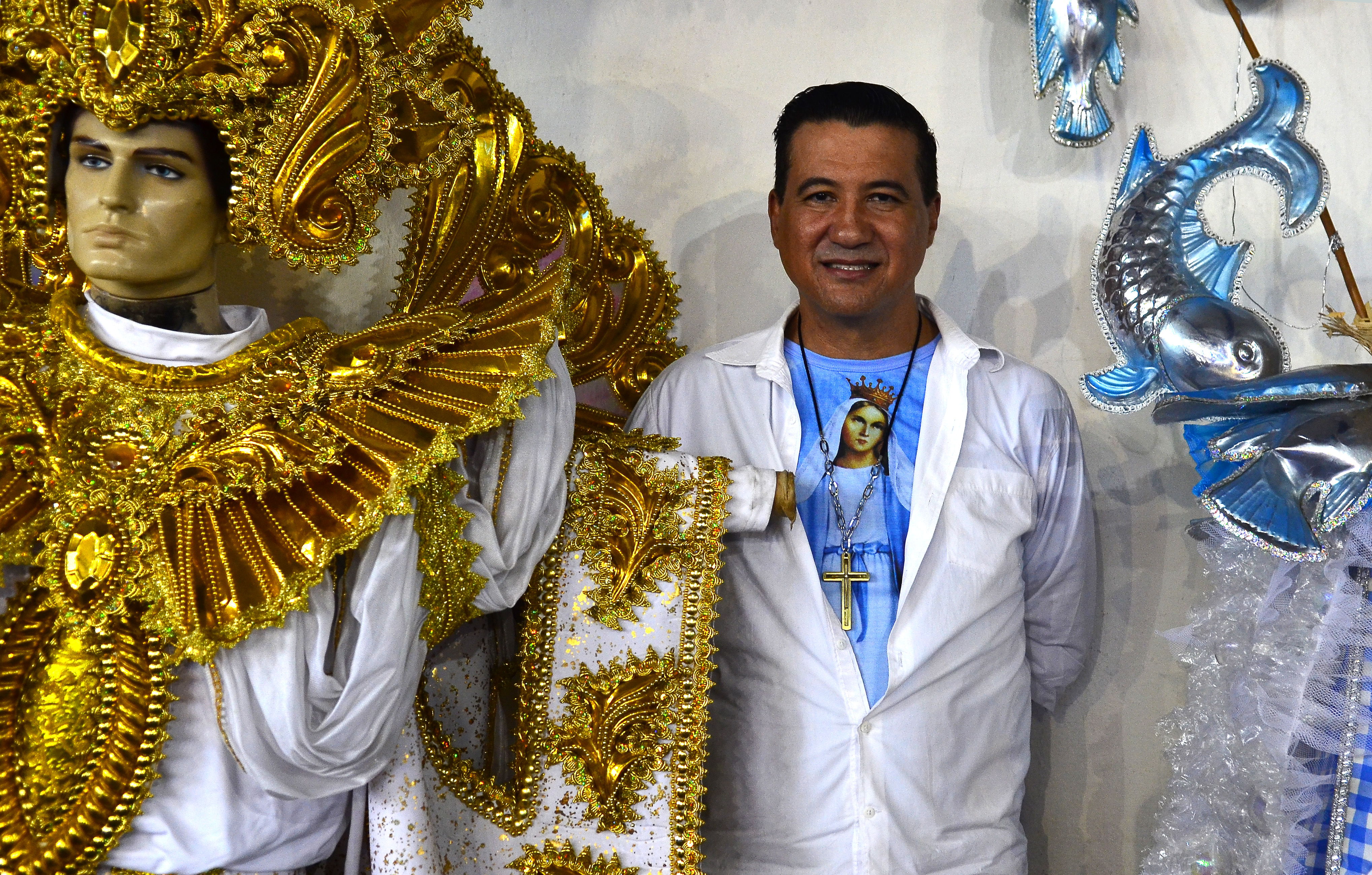 São Paulo - O carnavalesco da Águia de Ouro, Amarildo de Mello, aposta na criatividade para confeccionar as fantasias e compor os carros alegóricos sem estourar o orçamento (Rovena Rosa/Agência Brasil)